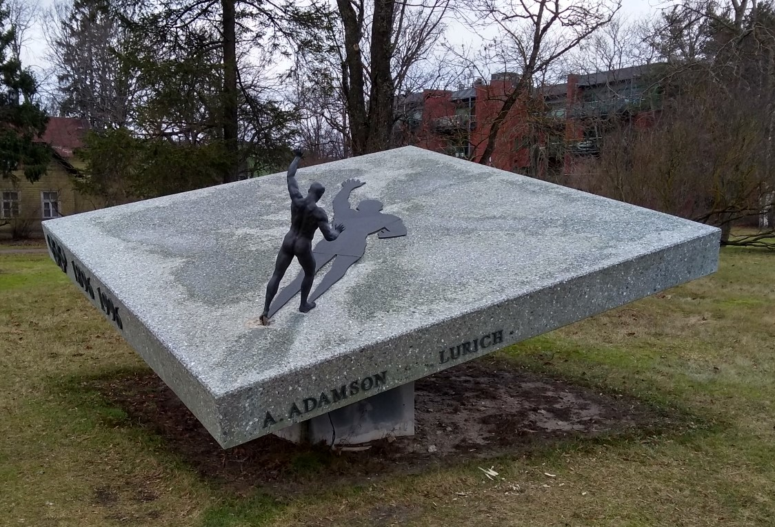 Lurichi monument Pirital